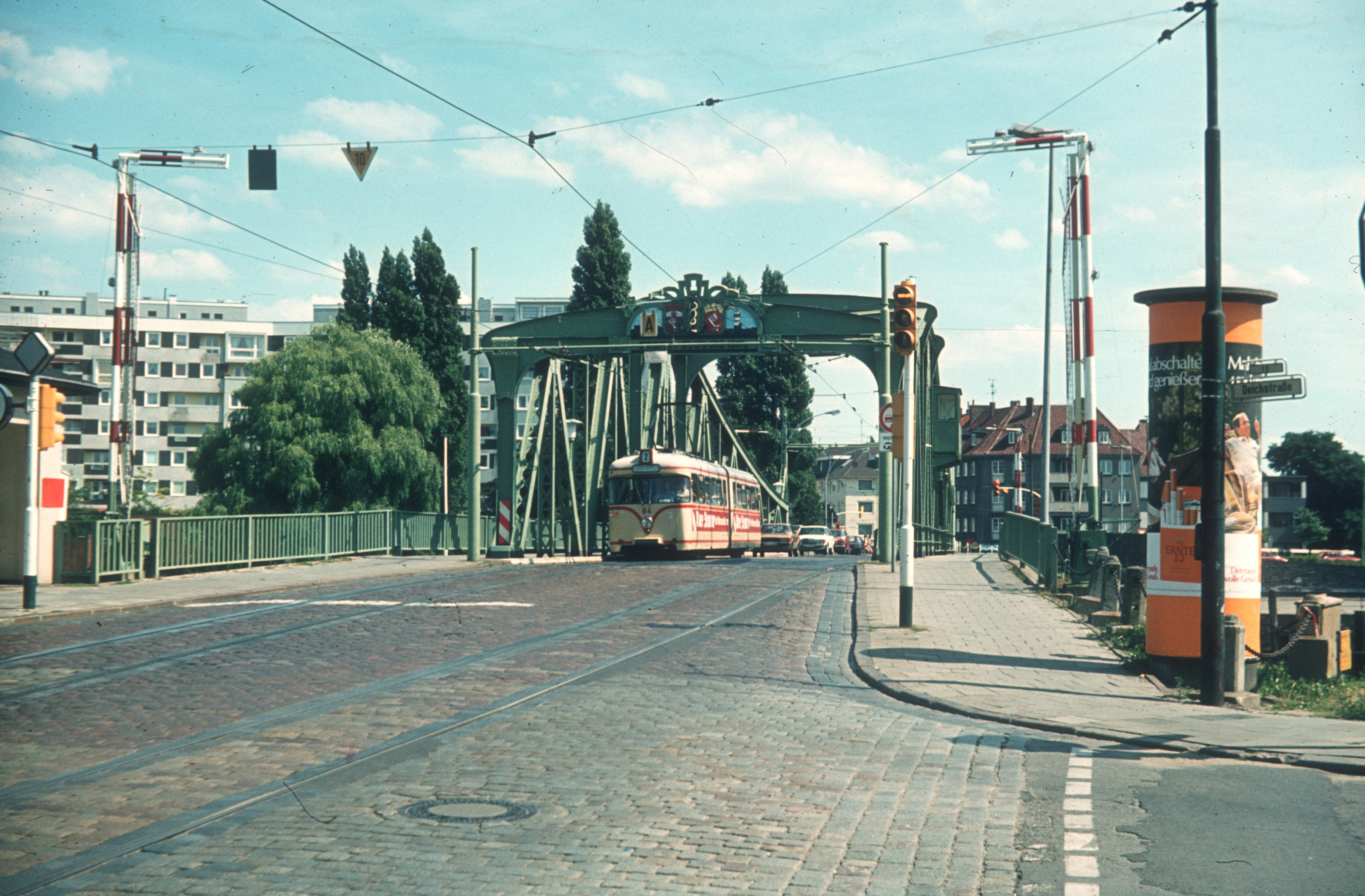 Alte Geestebrücke in Bremerhaven, Fährstraße, mit Straßenbahn, 1982.Das abgebildete Objekt ist ein geschütztes Kulturdenkmal in der Freien Hansestadt Bremen, mit der Nr. 1635 beim Landesamt für Denkmalpflege registriert.